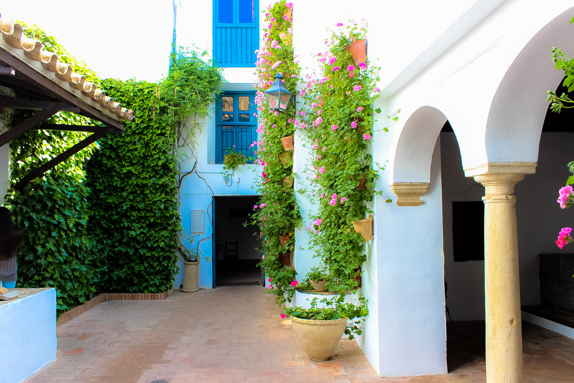 Patio de los Gatos del Palacio de Viana, Córdoba (España).